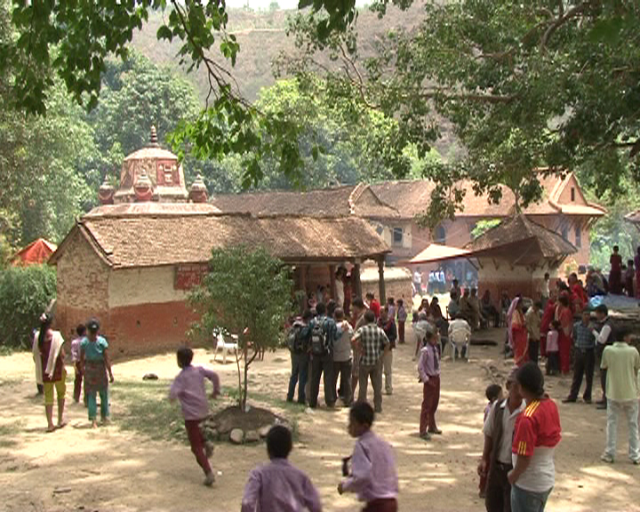 नेपाली: कुशेश्वर मन्दिर